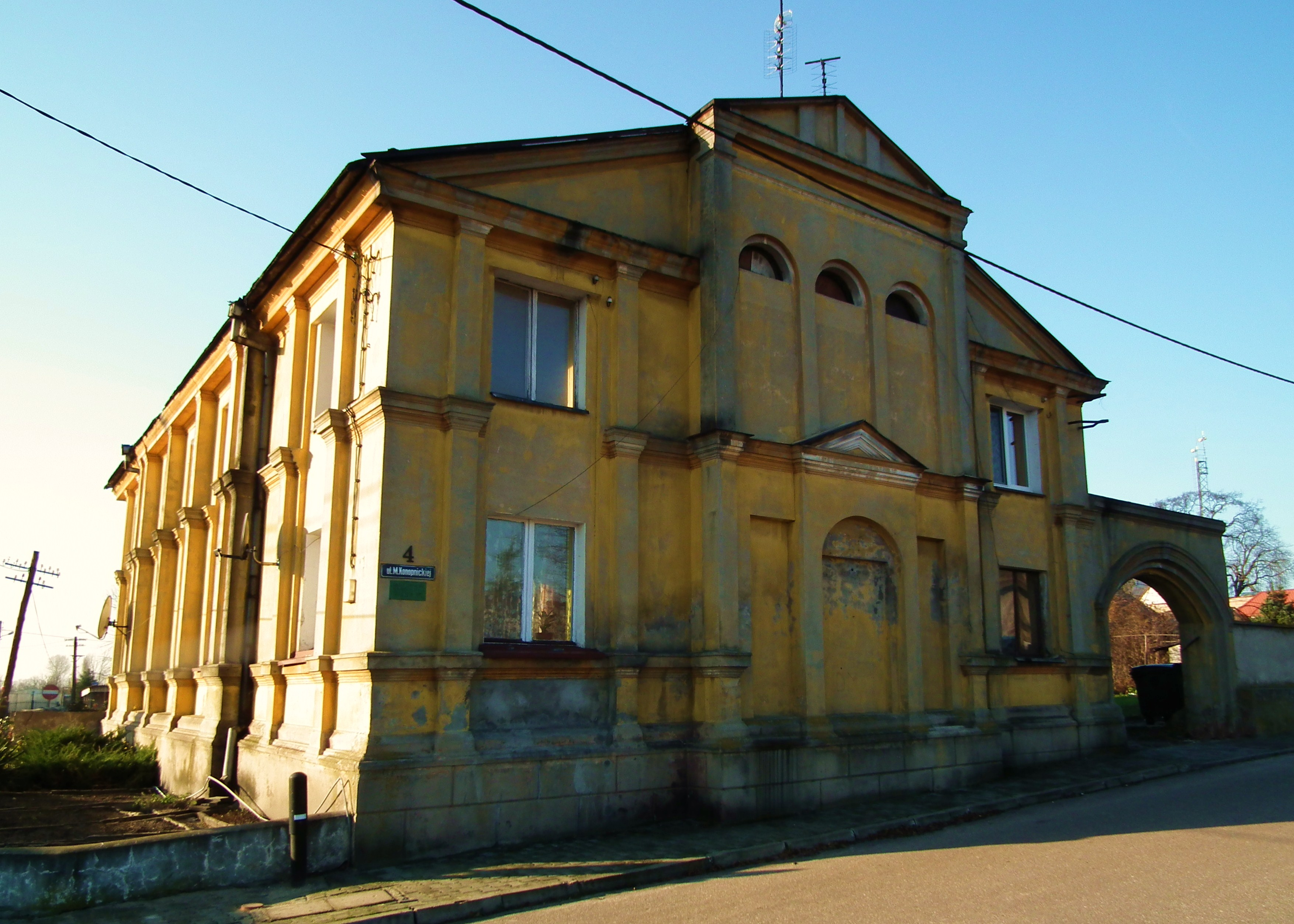 Dawna synagoga w Dąbiu nad Nerem.